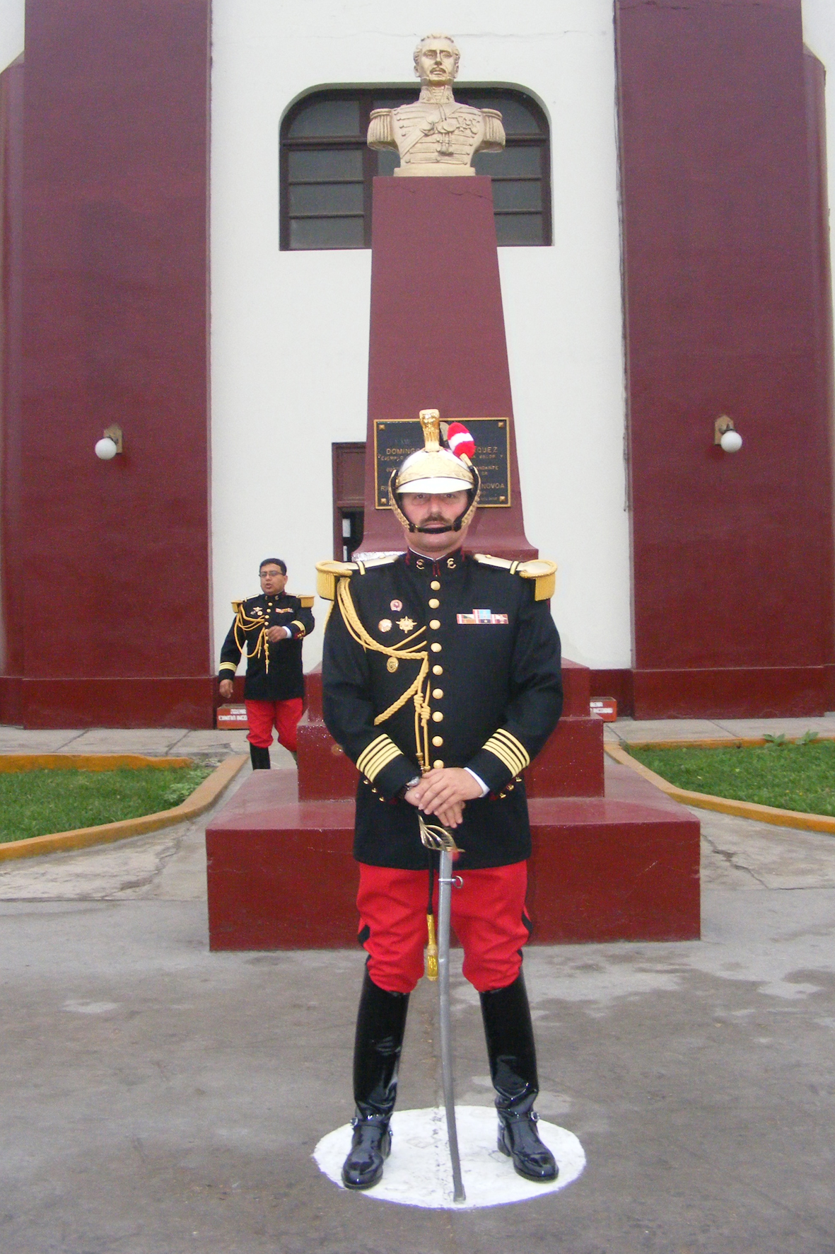 Uniforme de Dragon del Ejercito del Perú, estilo frances.